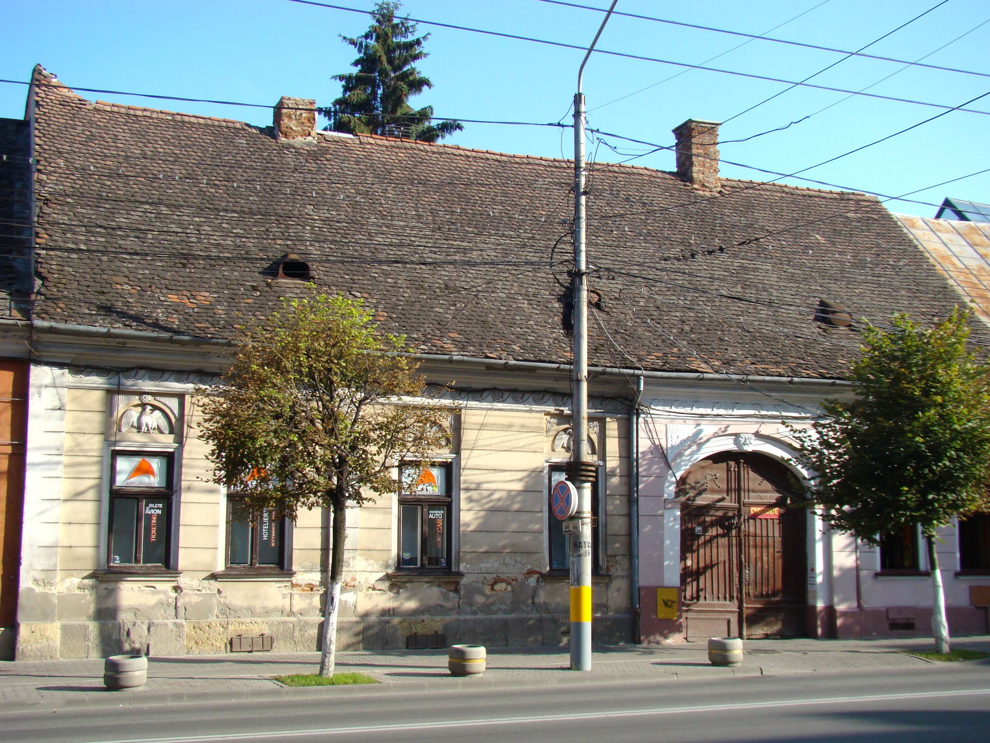 Casă, monument istoric, Bd.21 Decembrie 1989, nr.20